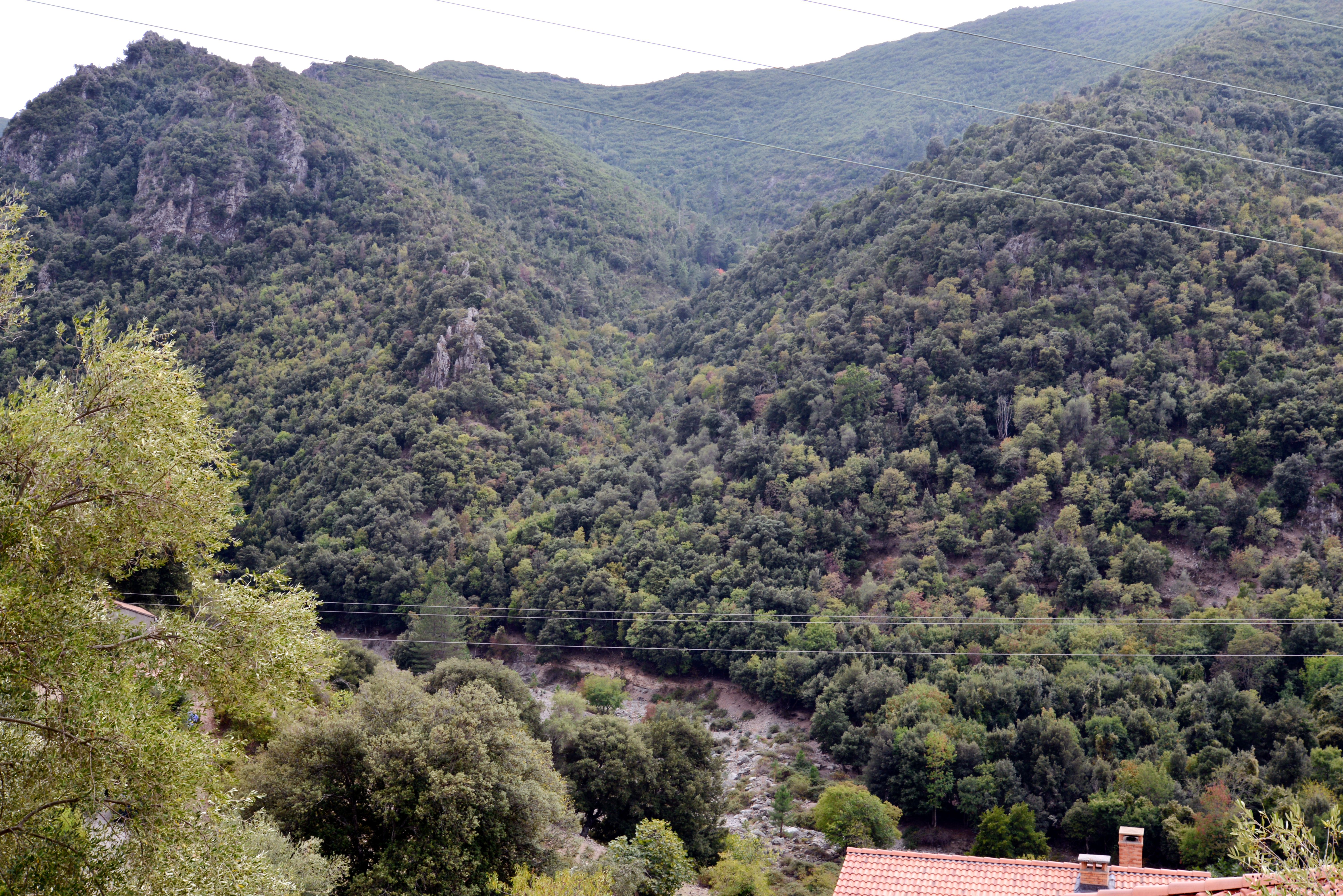 Omessa, Talcini (Corse)- La Serra di Strinezza qui fait face au village d'omessa, par delà le ruisseau de l'Elleratu